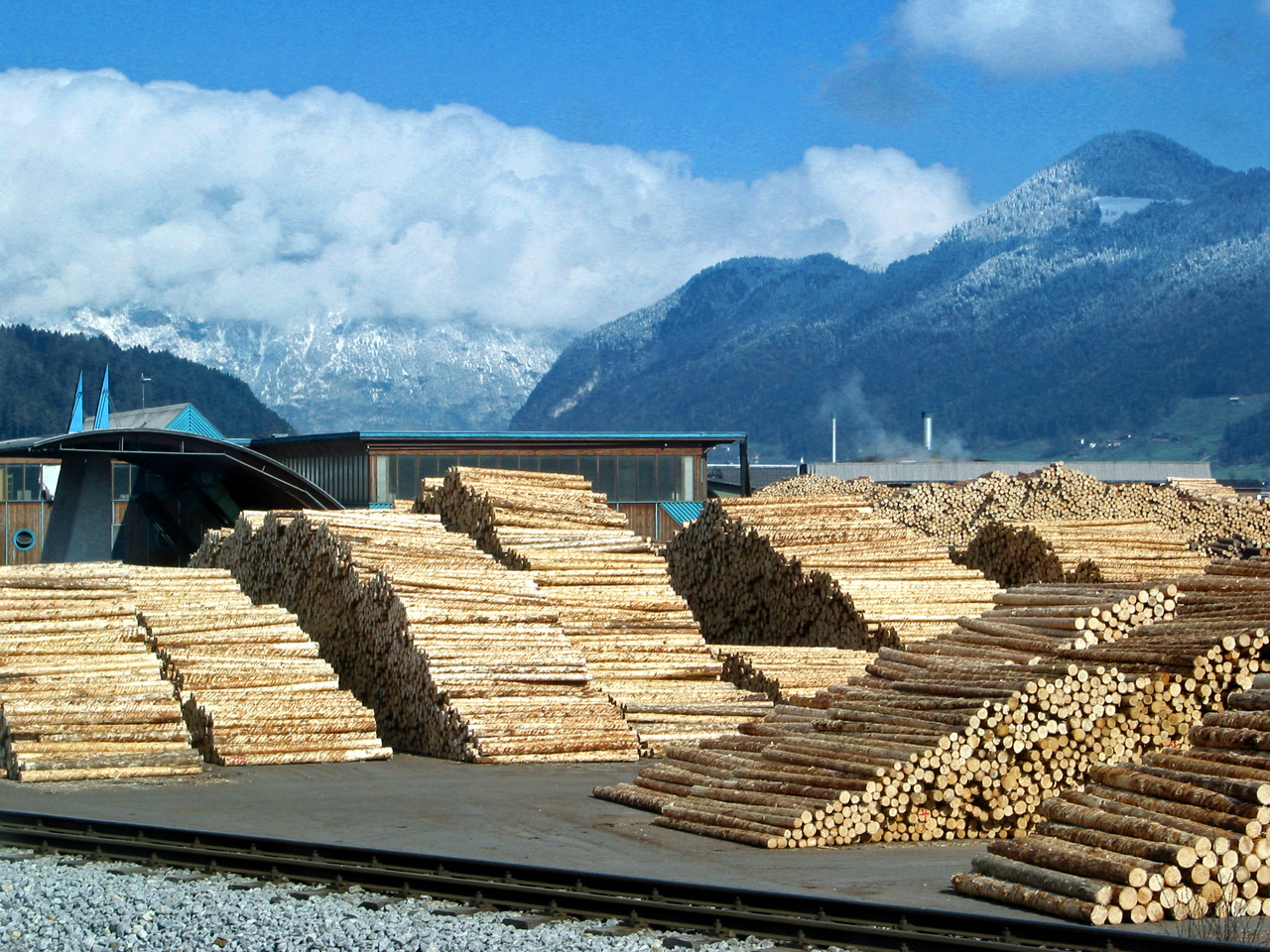 Komplementärkontrast (Sägewerk bei Fügen, Zillertal)